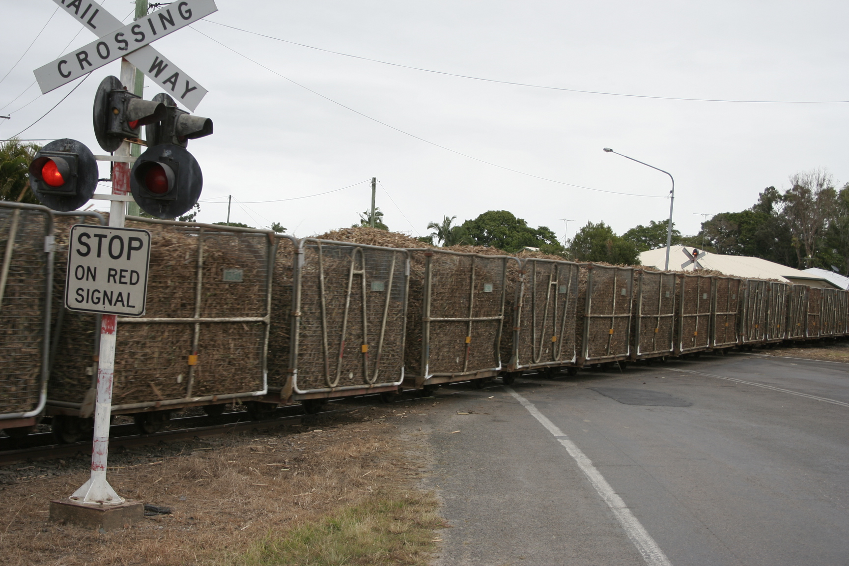 Sugar tram at Ingham mill